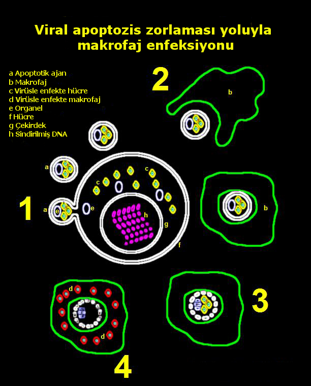 Bir tür viral çıkış.